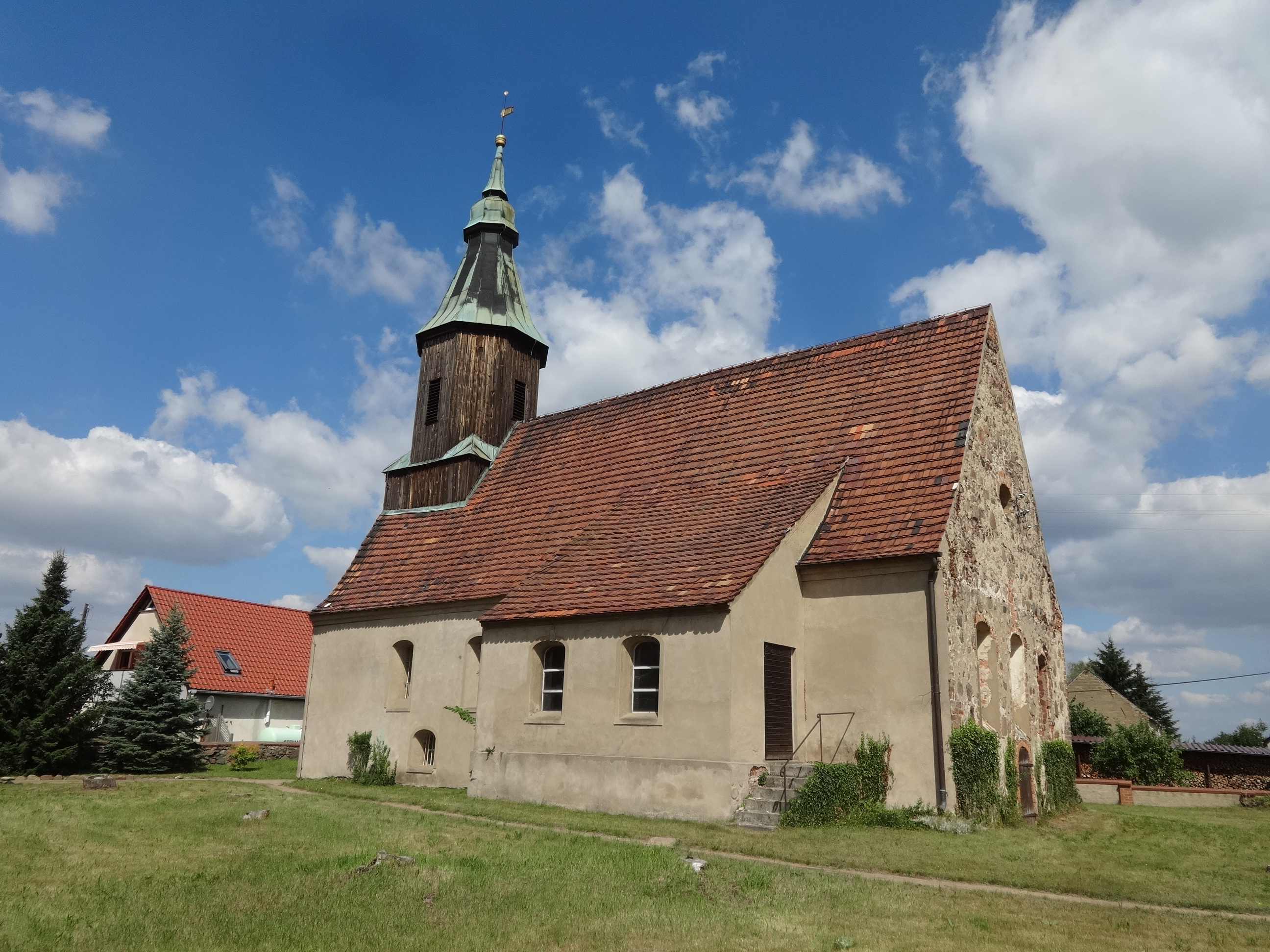 Die Dorfkirche in Pitschen-Pickel ist ein Saalbau aus Feldsteinen aus dem 15. Jahrhundert mit einer Patronatsloge aus dem Jahr 1675. Im Innern befindet sich ein Kanzelaltar mit einem Aufsatz aus dem Jahr 1684 sowie ein Kanzelkorb aus 1725/1726.